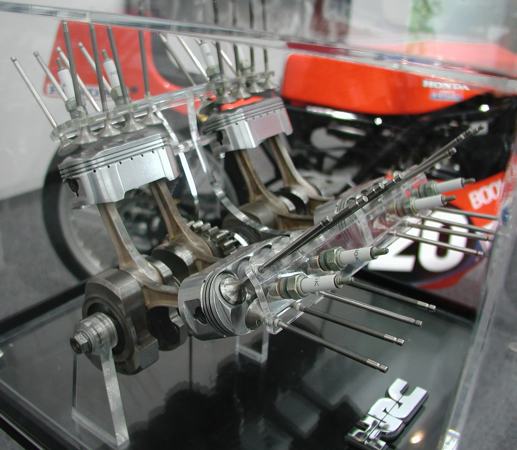 楕円ピストンエンジンのピストン・クランクシャフトの周辺 利用者:ux_zがホンダコレクションホールにて撮影 2007年3月25日にアップロード